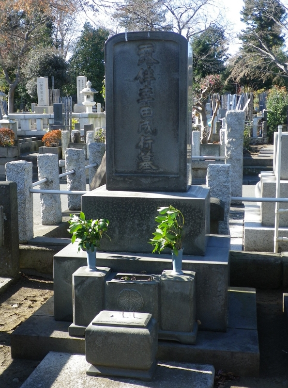 幸田露伴の墓